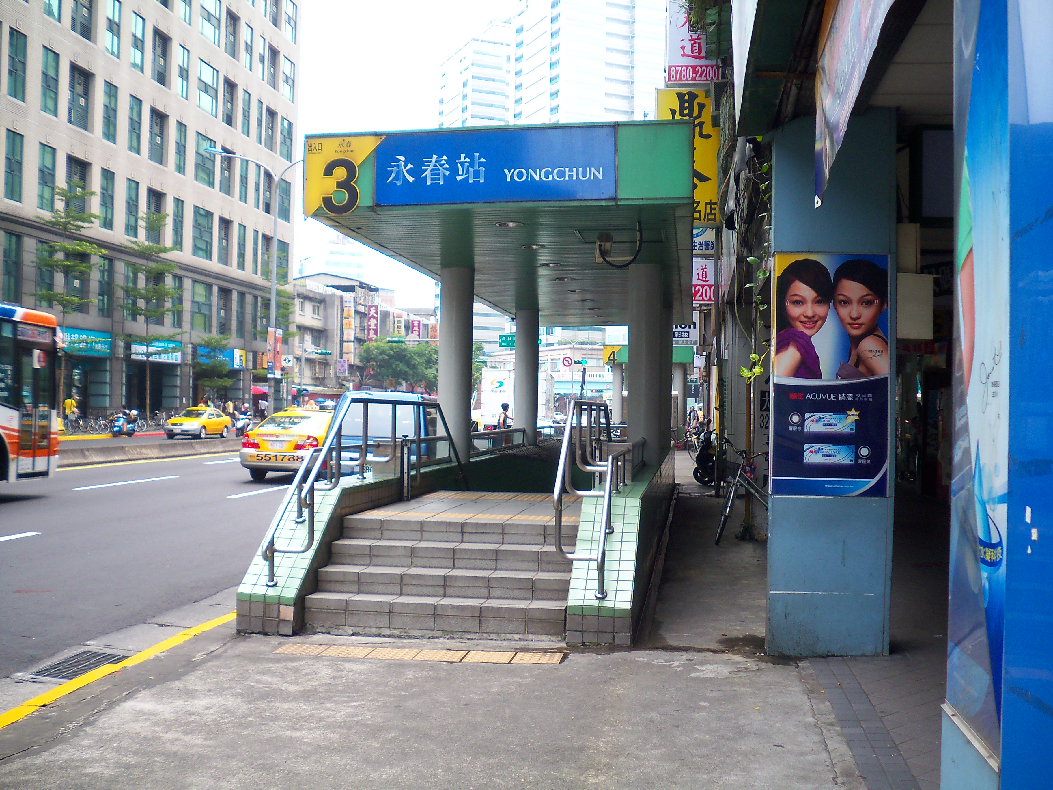 台北捷運南港線永春駅3号出口、後方は4号出口、忠孝東路反対側に5号出口ある。